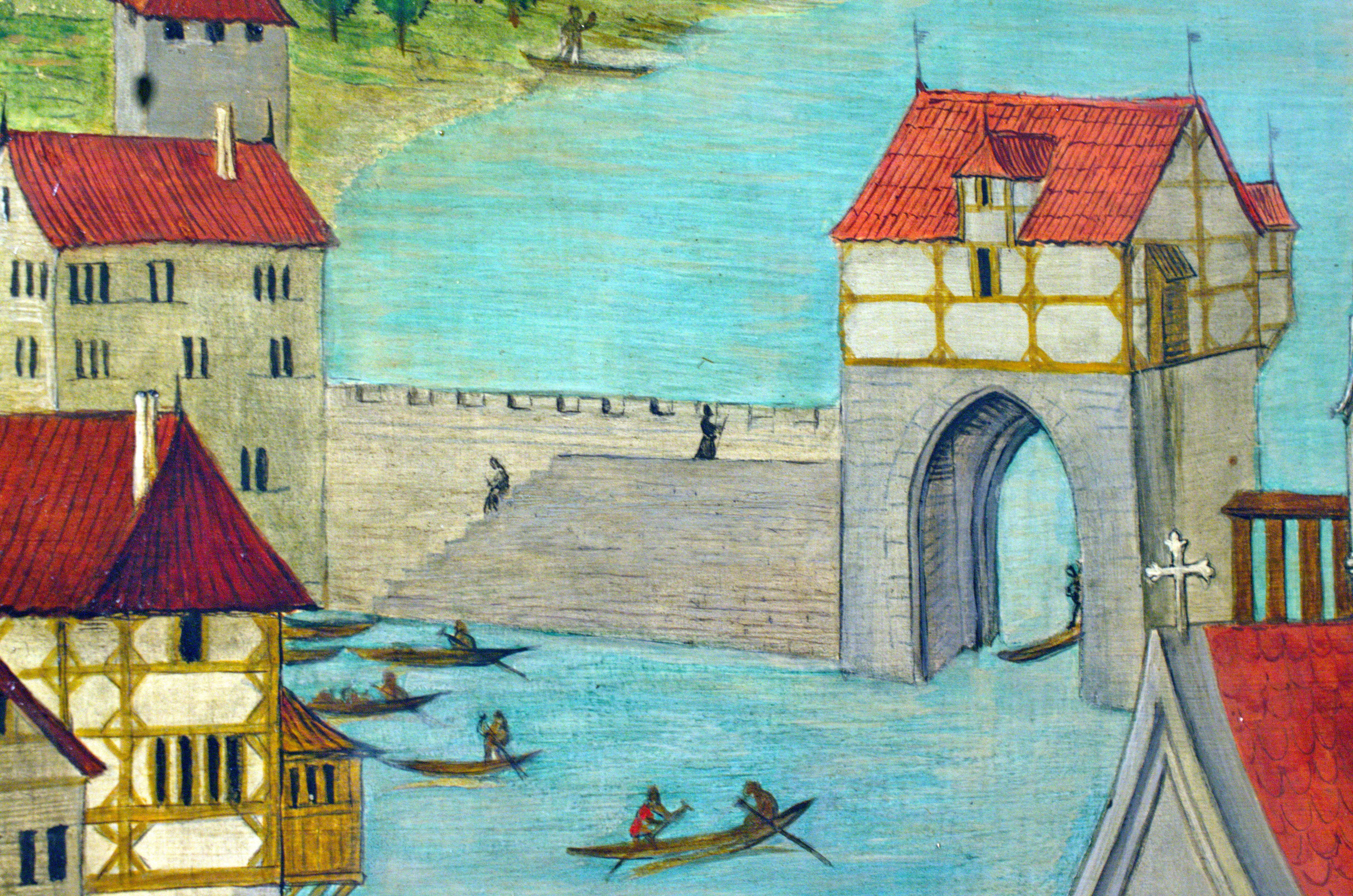 Das Grendeltor auf der Replik der Altartafeln von Hans Leu im Baugeschichtlichen Archiv der Stadt Zürich im Haus zum Rech. Die Panoramansicht des linksseitigen Limmatufers – 'Standort' der BetrachterIn ist wohl der Karlsturm des Grossmünsters – von Hans Leu d. Ä. gilt als die älteste zuverlässige Darstellung der Stadt Zürich, Ende des 15. Jahrhunderts auf den Altartafeln im Grossmünster mit viel Liebe zum Detail festgehalten. Die originalen Tafeln sind heute im Landesmuseum ausgestellt, eine (vermutlich) 1:1 Replik ist im Stadtarchiv öffentlich zugänglich.